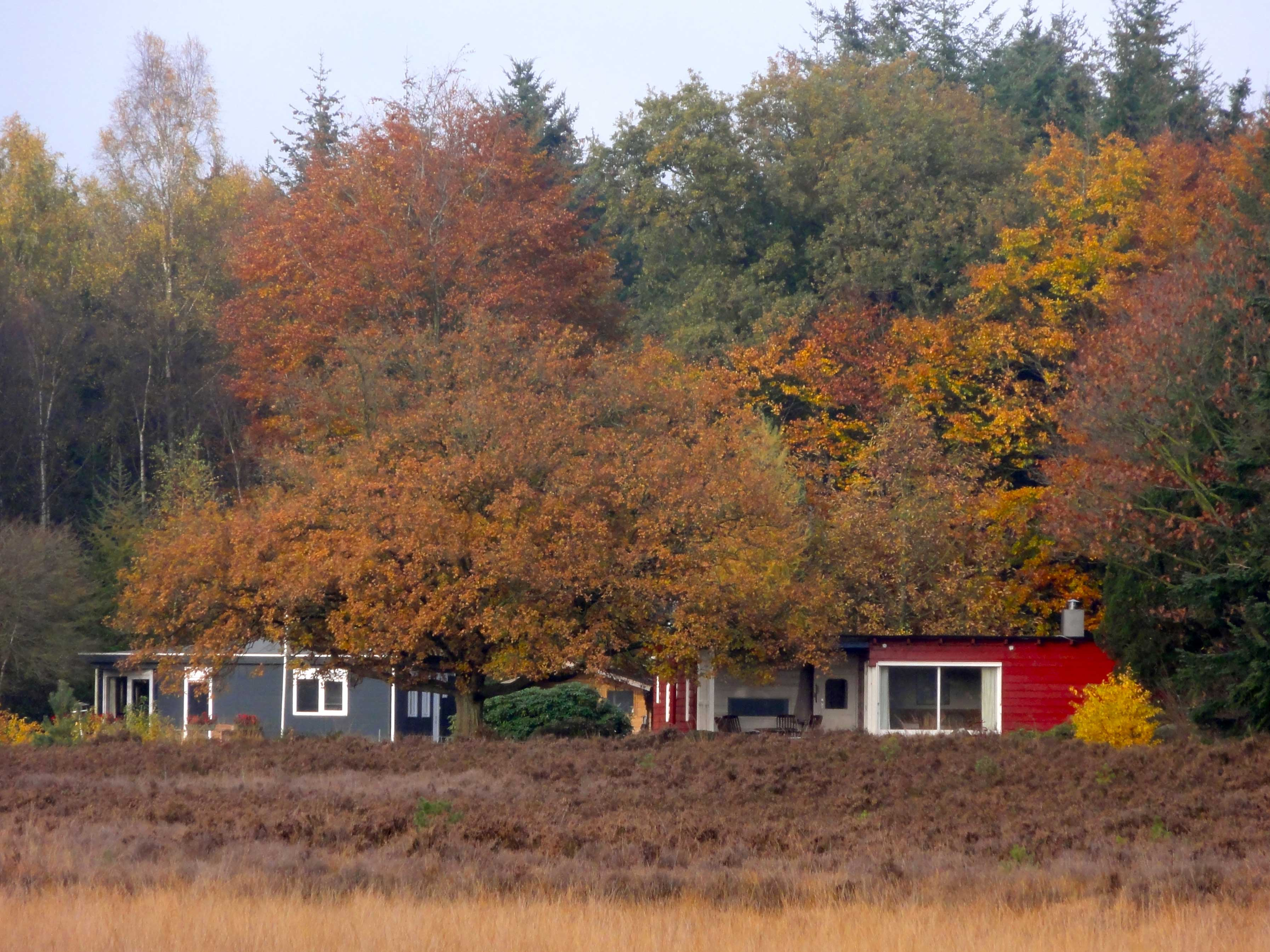 Het landgoed Meindersveen met zomerhuisje